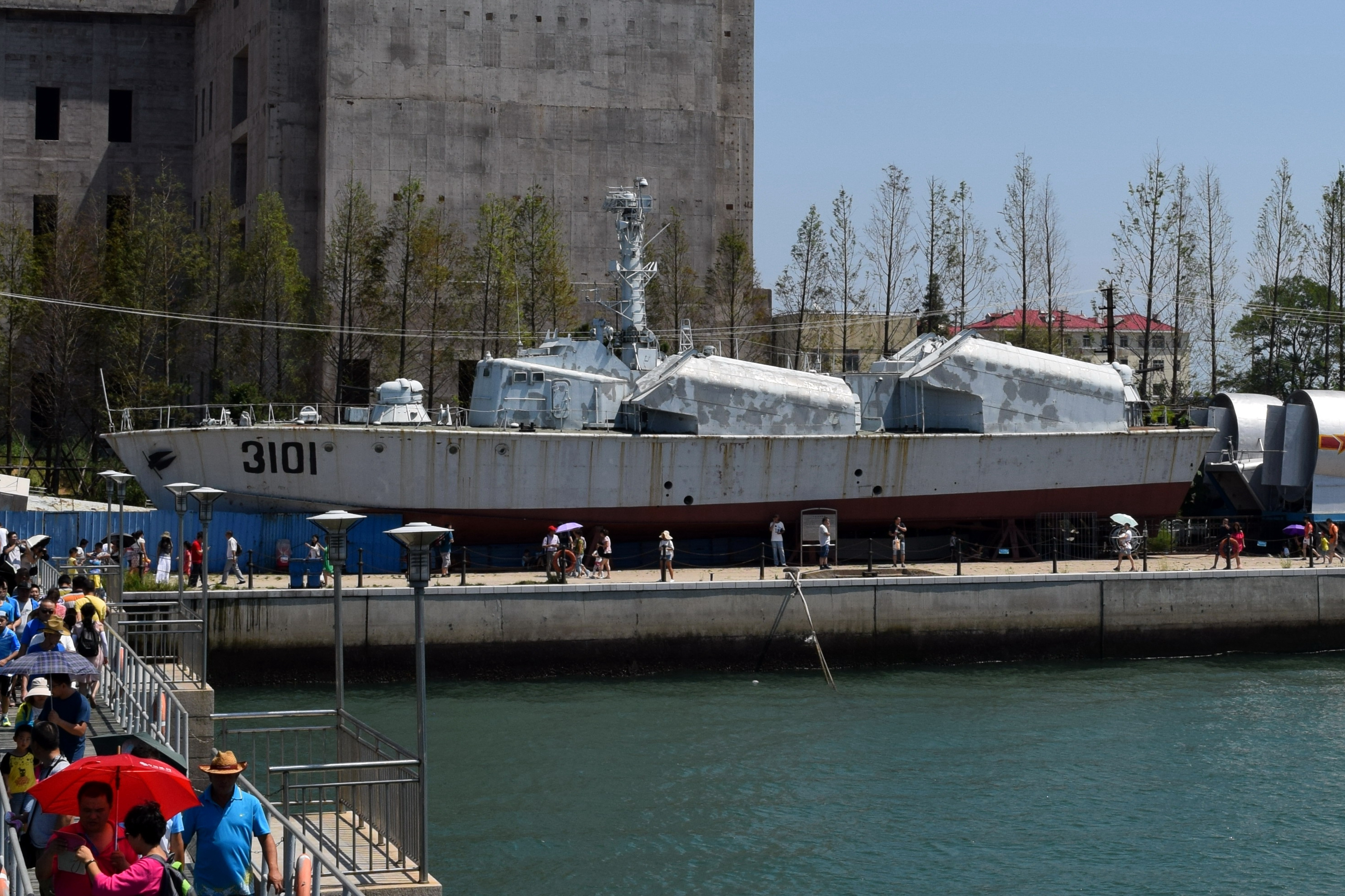 青岛海军博物馆6621型3101号导弹艇